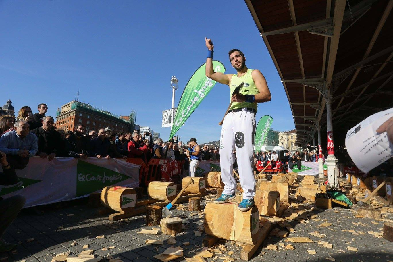 2017ko Bizkaiko Aizkolari Txapelketaren une bat.